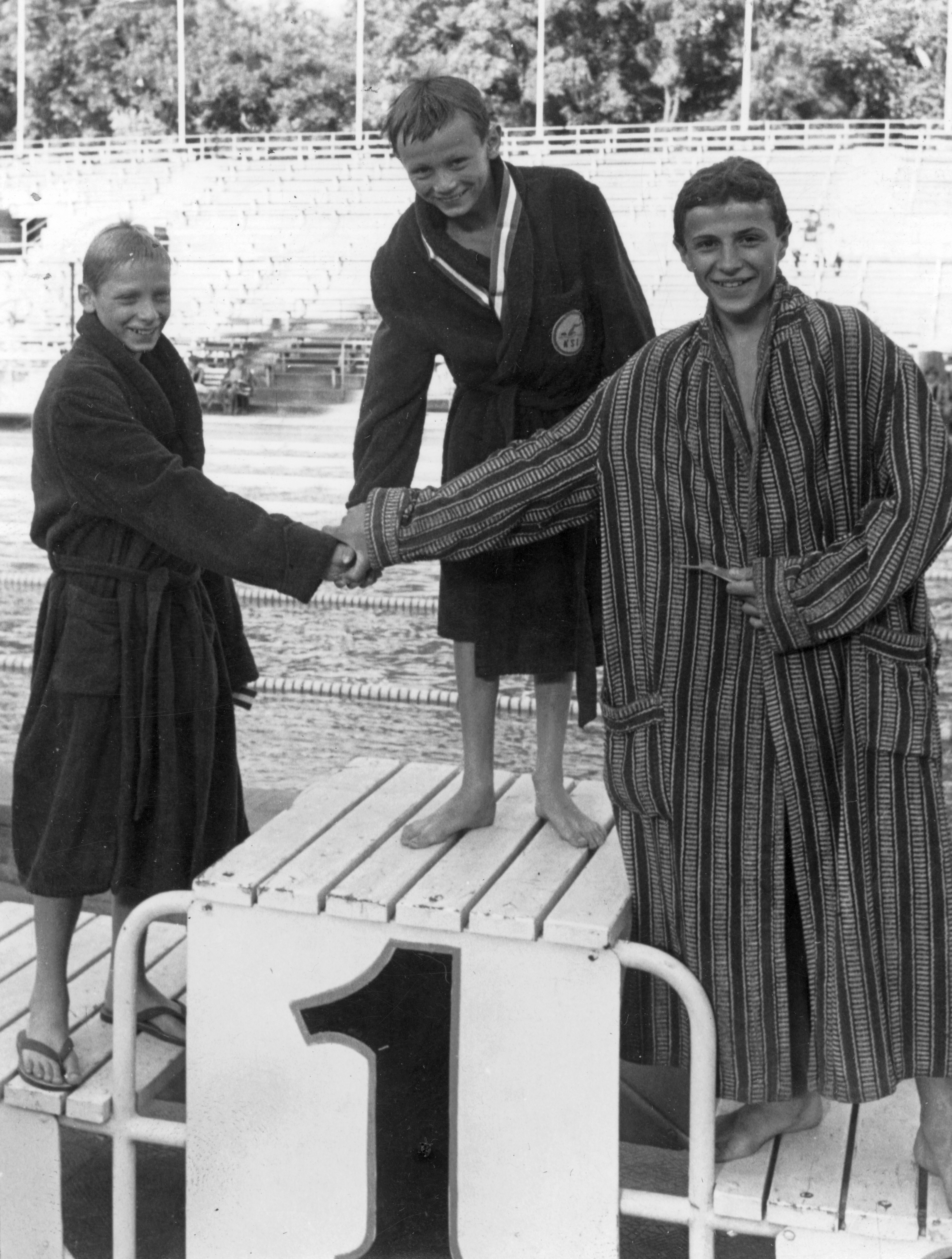 Hajós Alfréd Nemzeti Sportuszoda, Úttörőolimpia. Location: Hungary, Budapest, Margit Islands Tags: bathrobe, stand, swimming pool, competition, pioneer Title: Hajós Alfréd Nemzeti Sportuszoda, Úttörőolimpia.